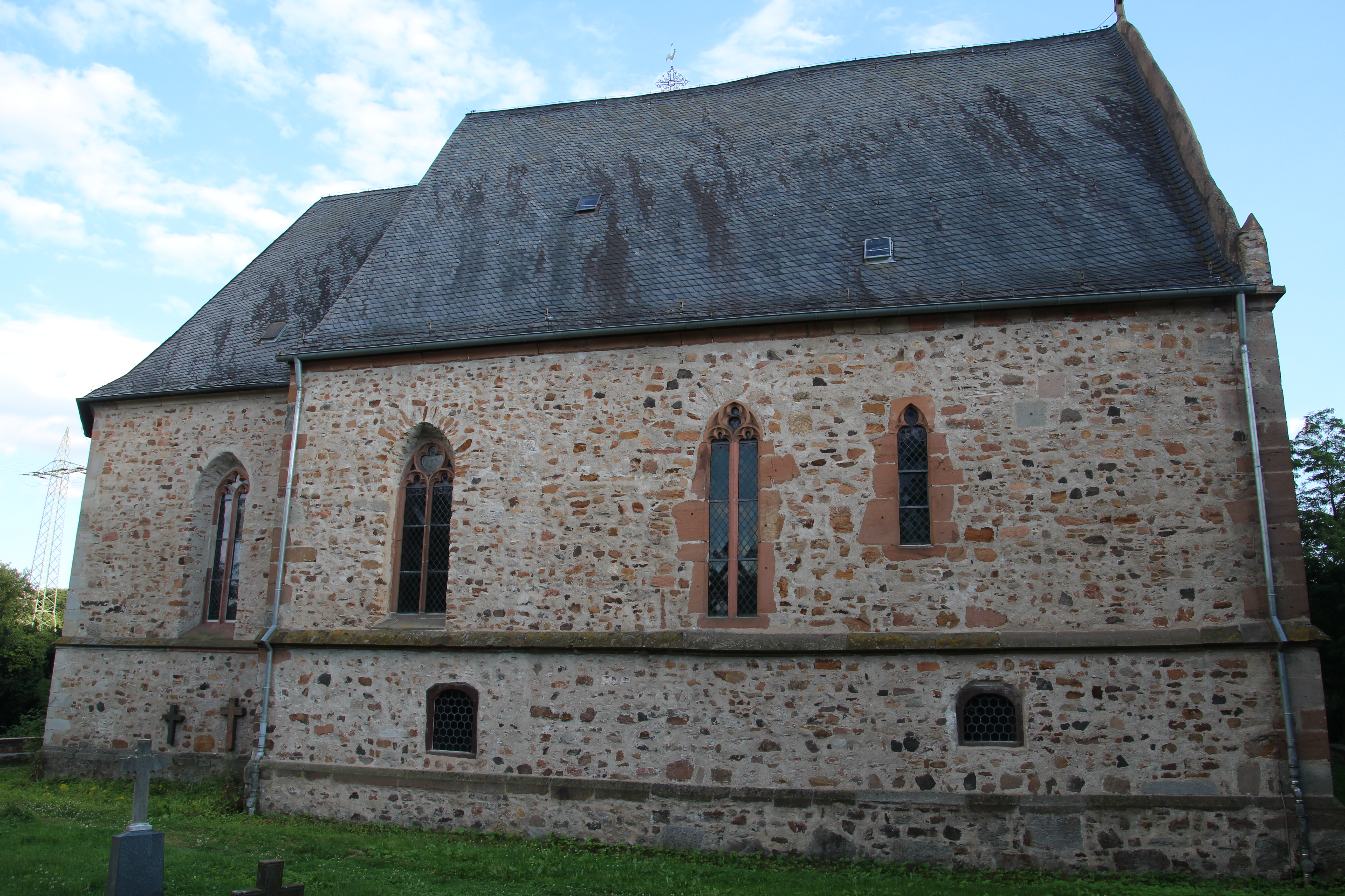 Kirchberg